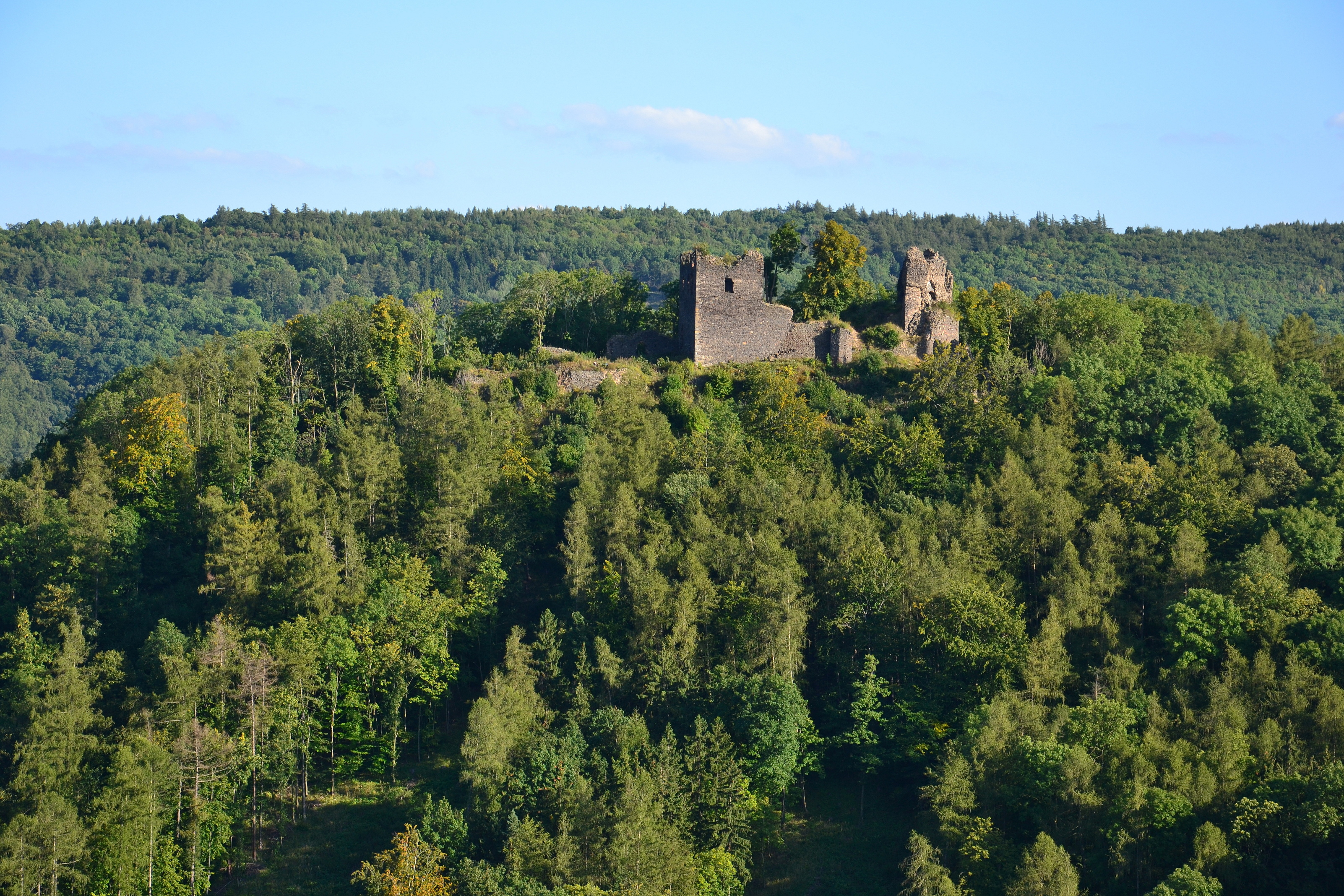 Egerberk - pohled z vrchu Mravenčák